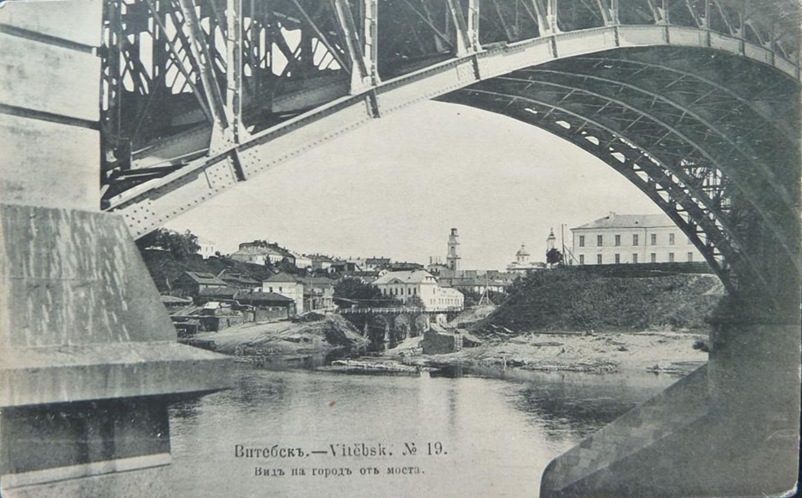 Беларуская (тарашкевіца): Віцебск (Viciebsk), Дзьвінскі мост (Dźvinski most) і вусьце Віцьбы (Vićba)